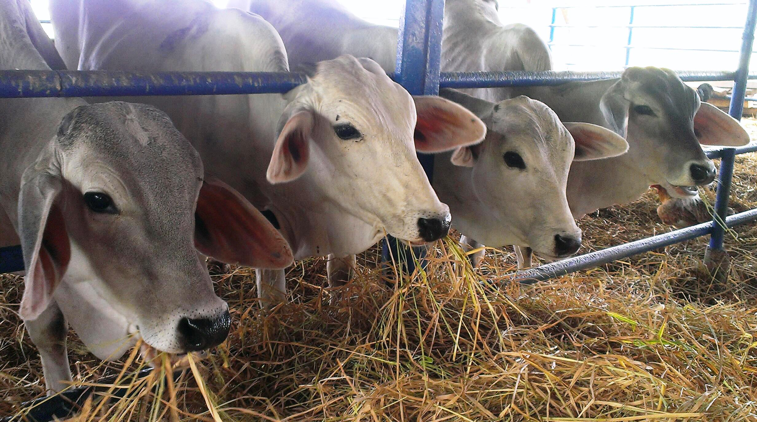 Cuatro becerros comiendo paja de arroz en Calabozo, Estado Guárico.